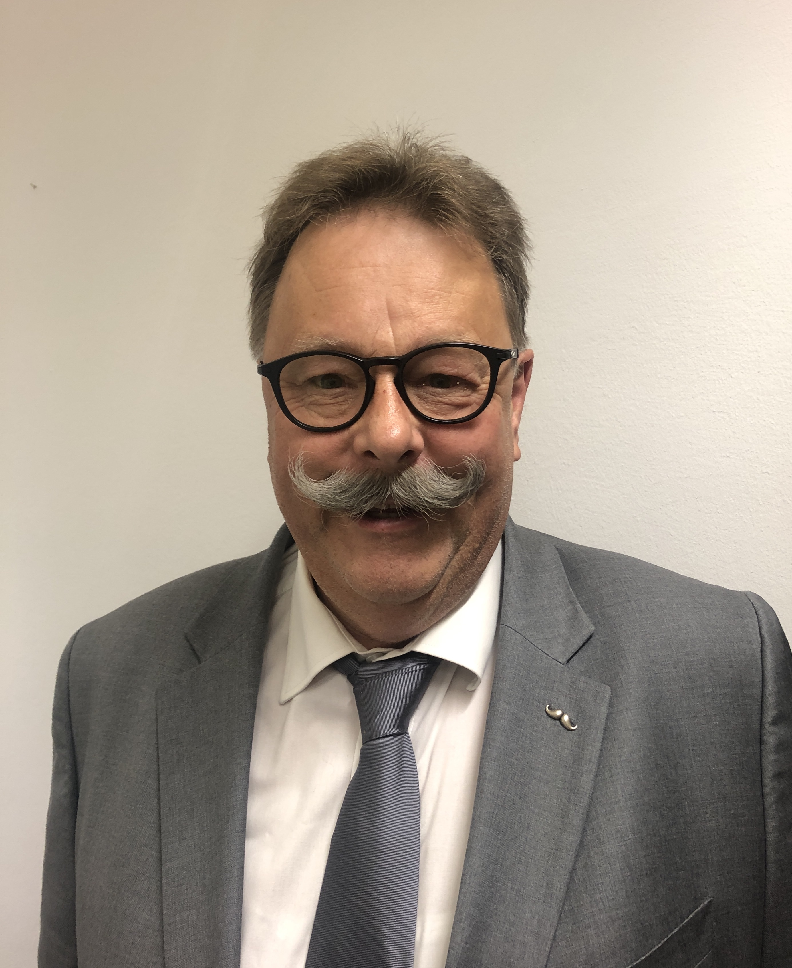 Reginald Hanke, Mitglied des Deutschen Bundestages seit 15. November 2019. FDP-Fraktion.